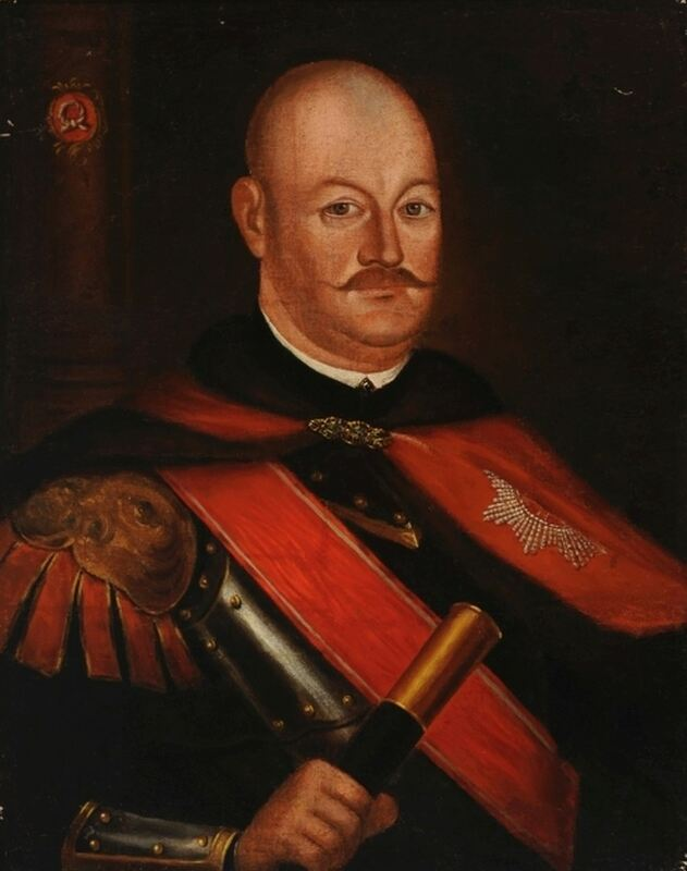 Беларуская (тарашкевіца): Партрэт Яна Міхала Гурскага (Jan Michał Hurski)